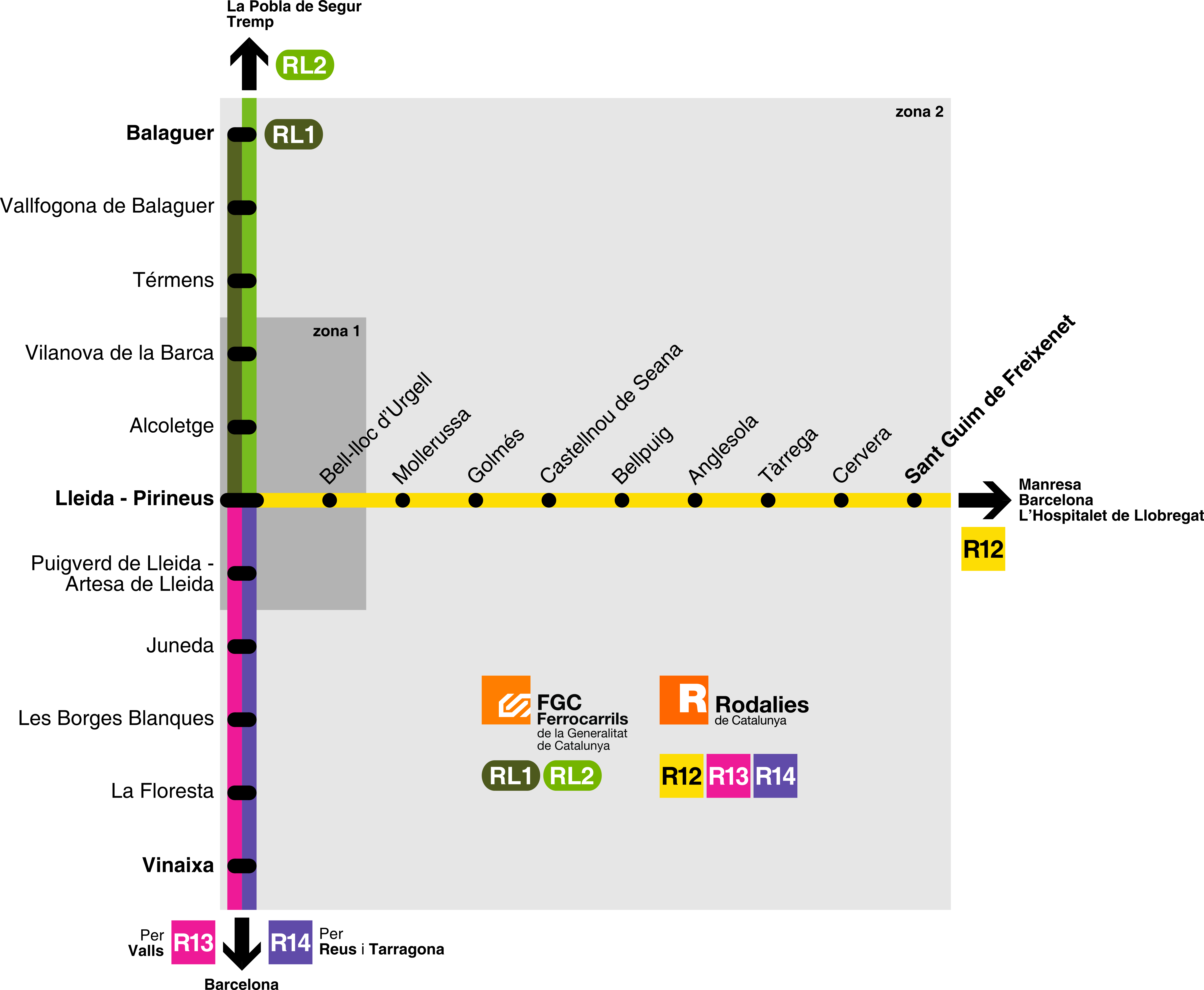 Mapa del servei de rodalia de l'Àrea de Lleida